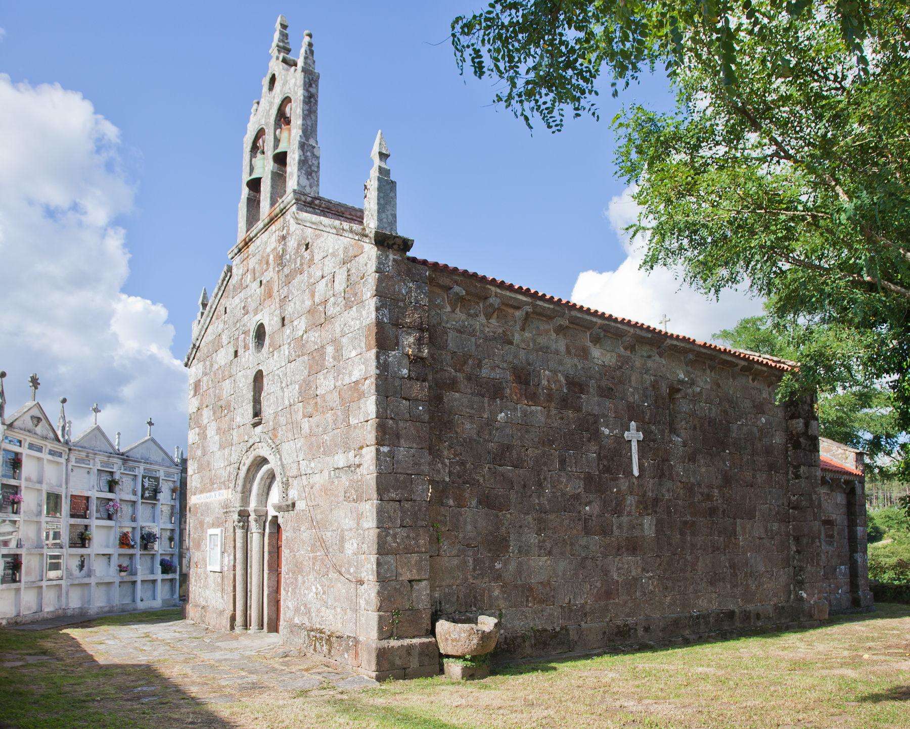 Igrexa de Santa Locacia de Frixe, Muxía, Galiza